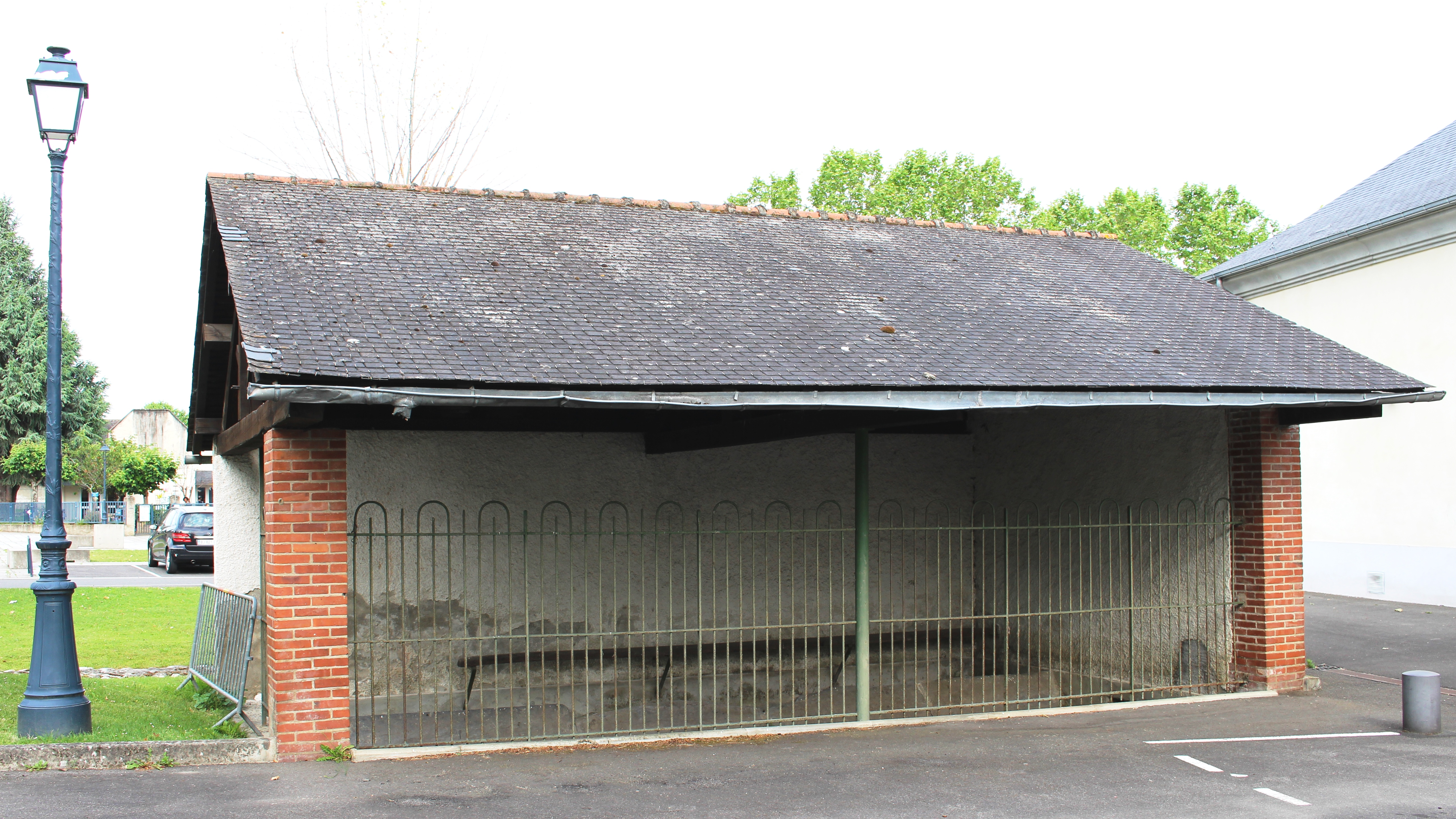 Lavoir de Laloubère (Hautes-Pyrénées)